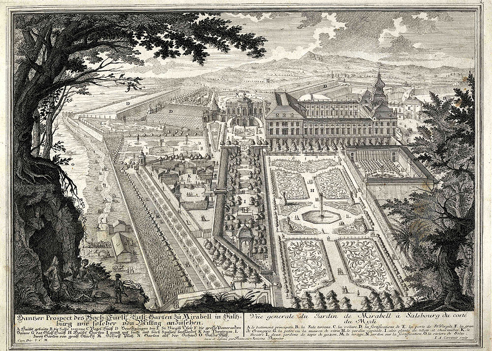 "Gantzer Grundriß des Hoch-Fürstl. Bebäues u[nd] Garten zu Mirabell in Saltzburg". Exemplar der Universitätsbibliothek Salzburg (dort beigebunden dem Werk Die Saltzburgische Kirchen-Prospect)